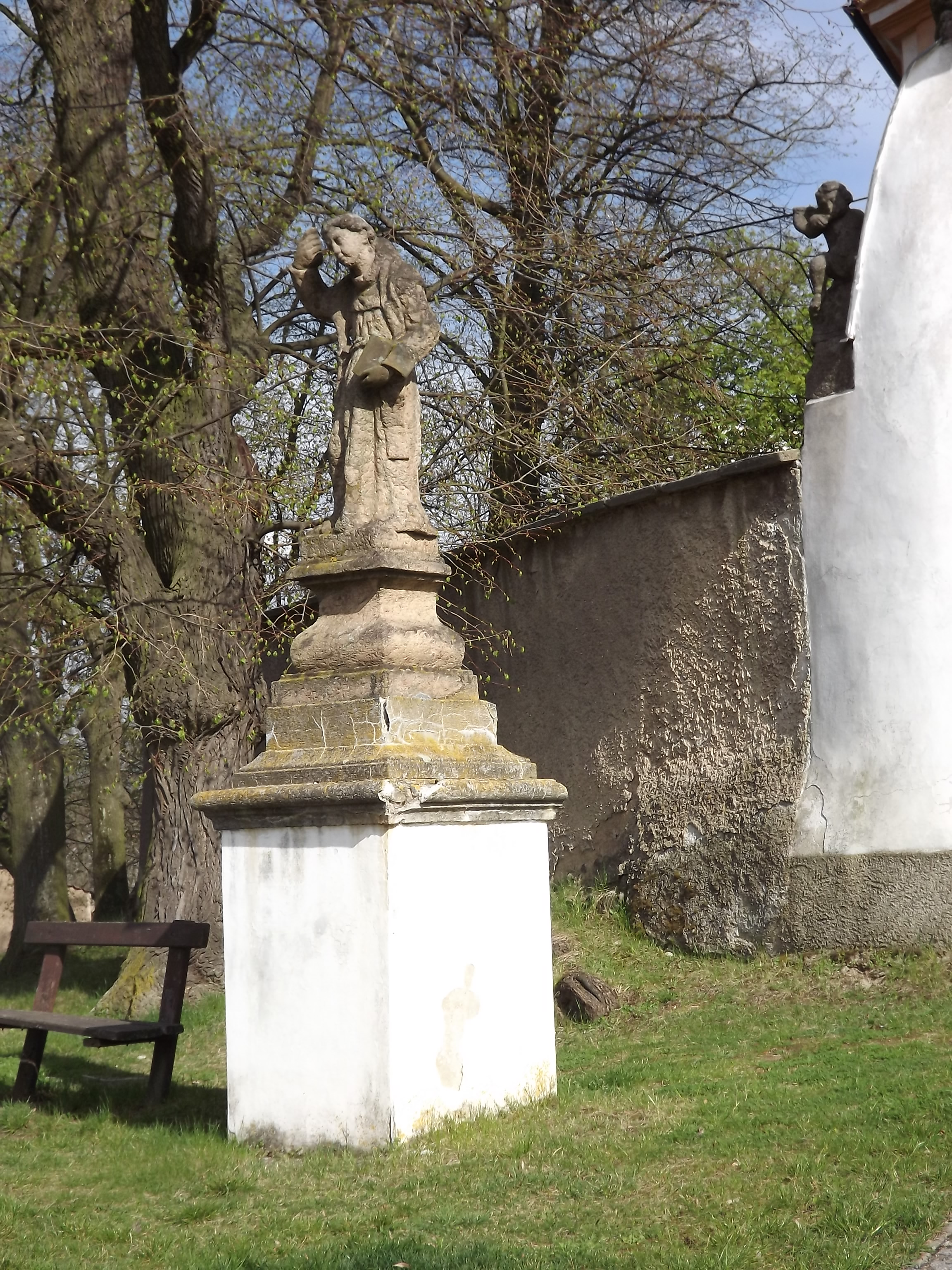 Kostel Nanebevzetí P. Marie (Pičín)